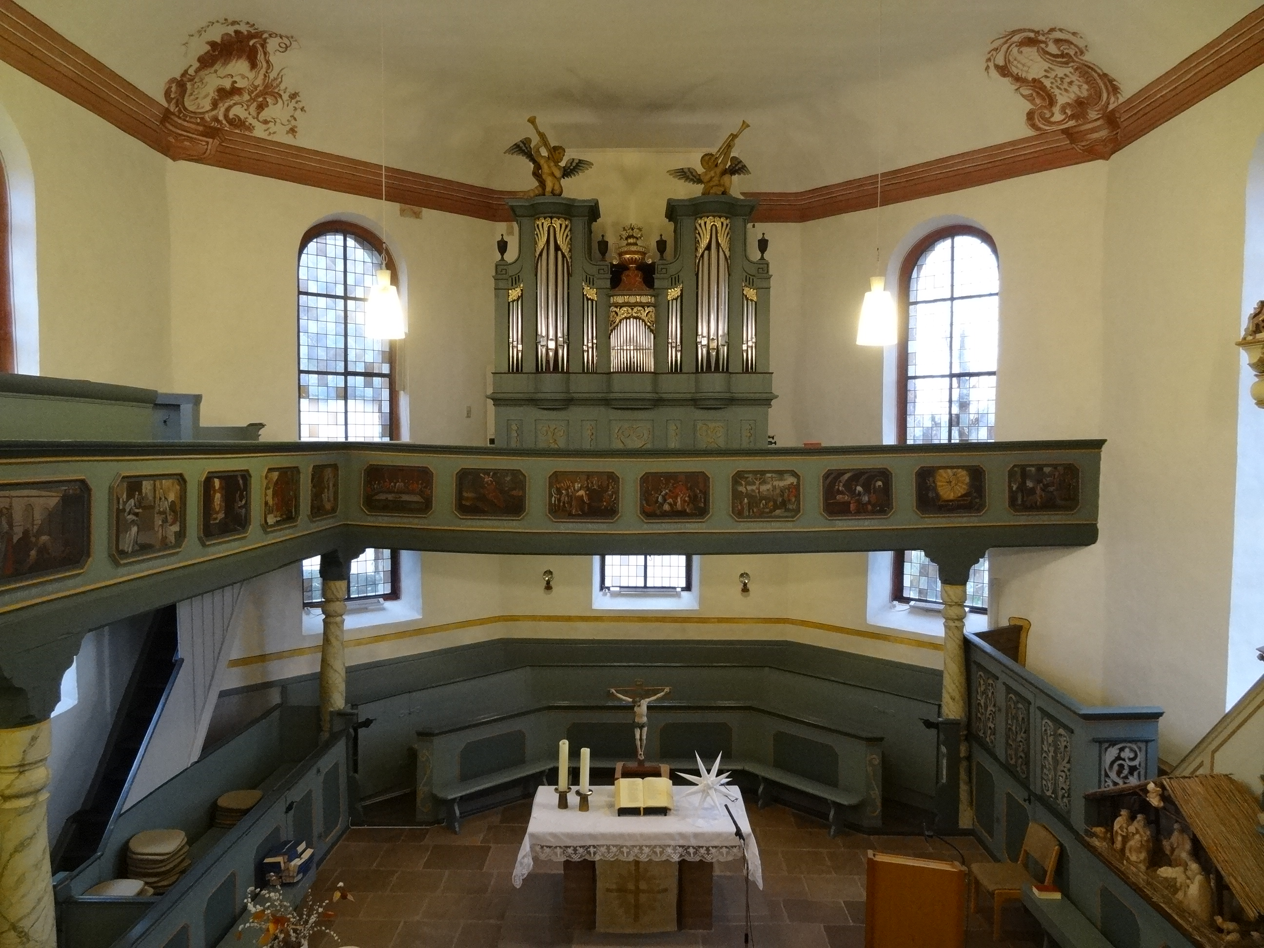 St. Michaelis Oberkleen